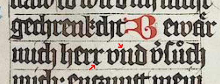 Quadrangeln am Beispiel der Textura. Ausschnitt aus der „Biblia pauperum“ (Eichstätt/Bayern 1430-1450).